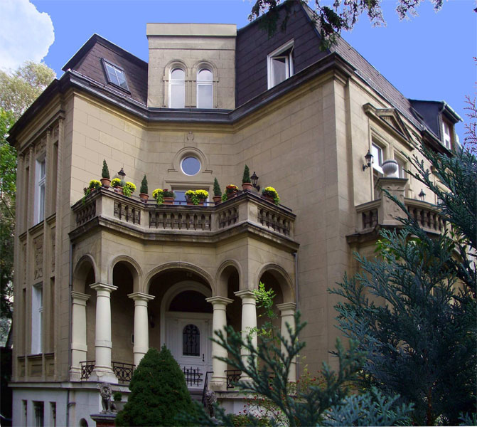 Villa in Lichterfelde West / Berlin, Germany. erbaut von Robert Poseck 1901/1902